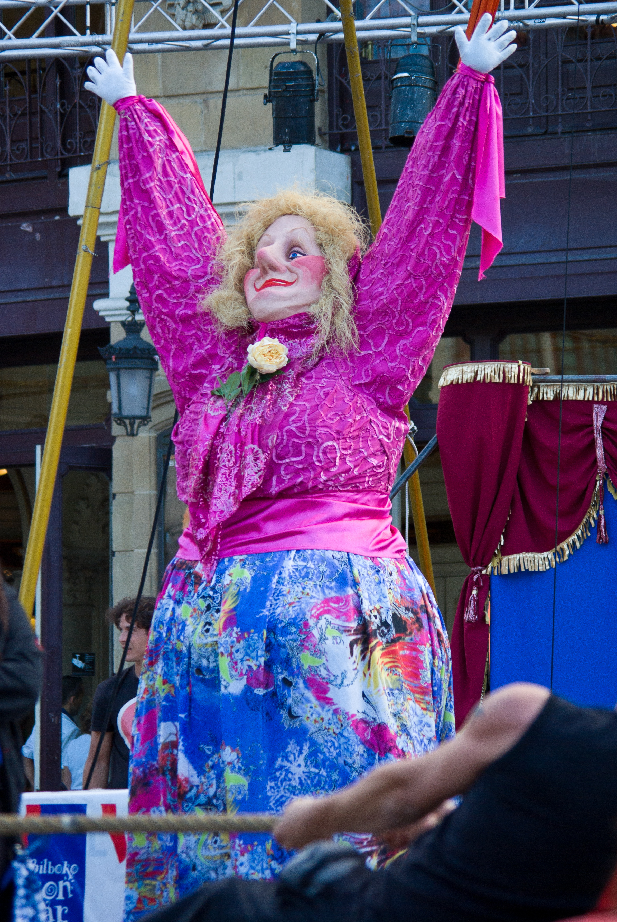 Gure Marijaia